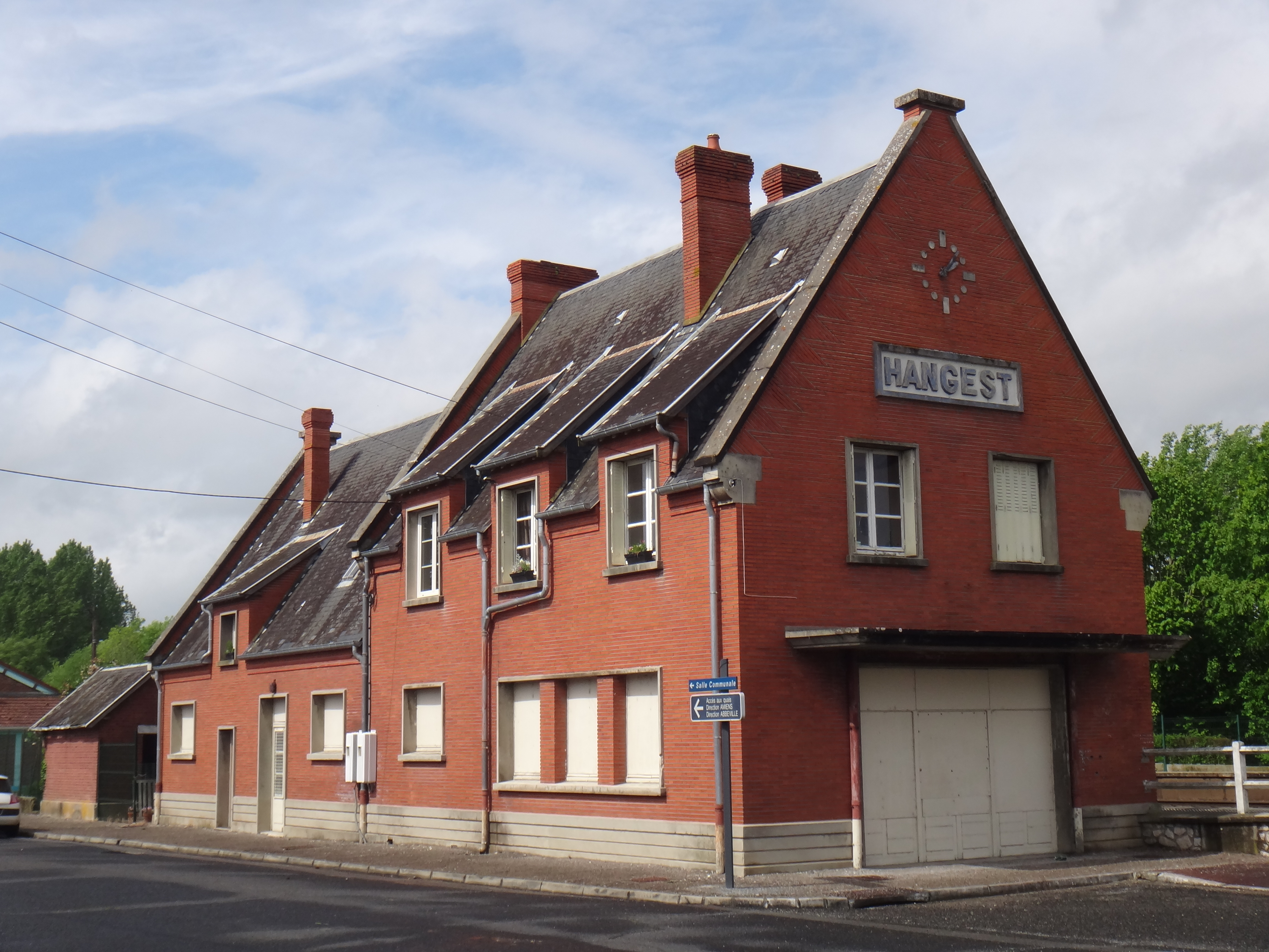 Bâtiment de la gare d'Hangest, Somme, Picardie, France, en mai 2014.